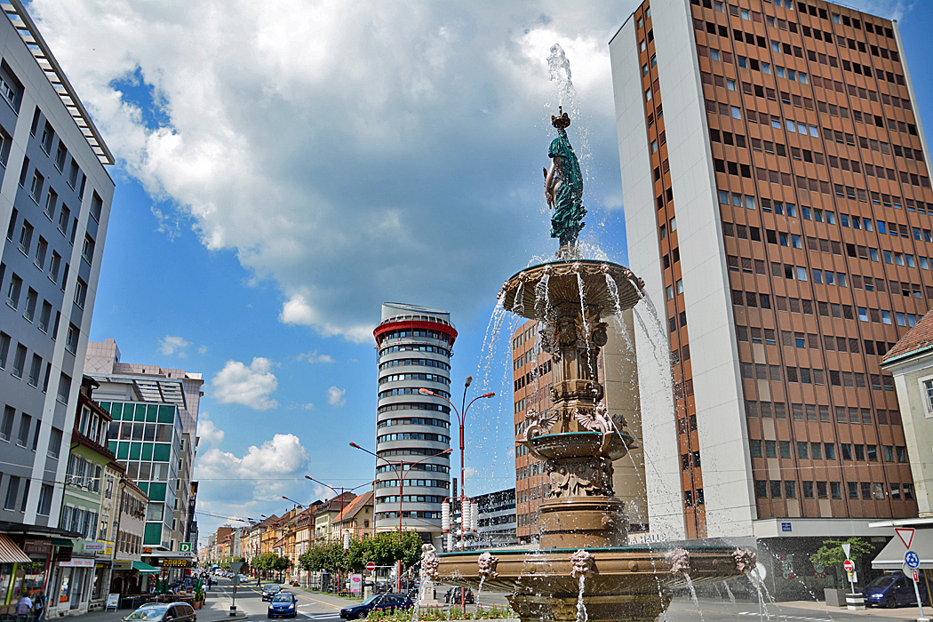 Fontaine Monumentale, La Chaux-de-Fonds